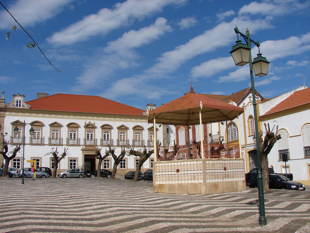 Plaza en esta localidad portuguesa del distrito de Portalegre.